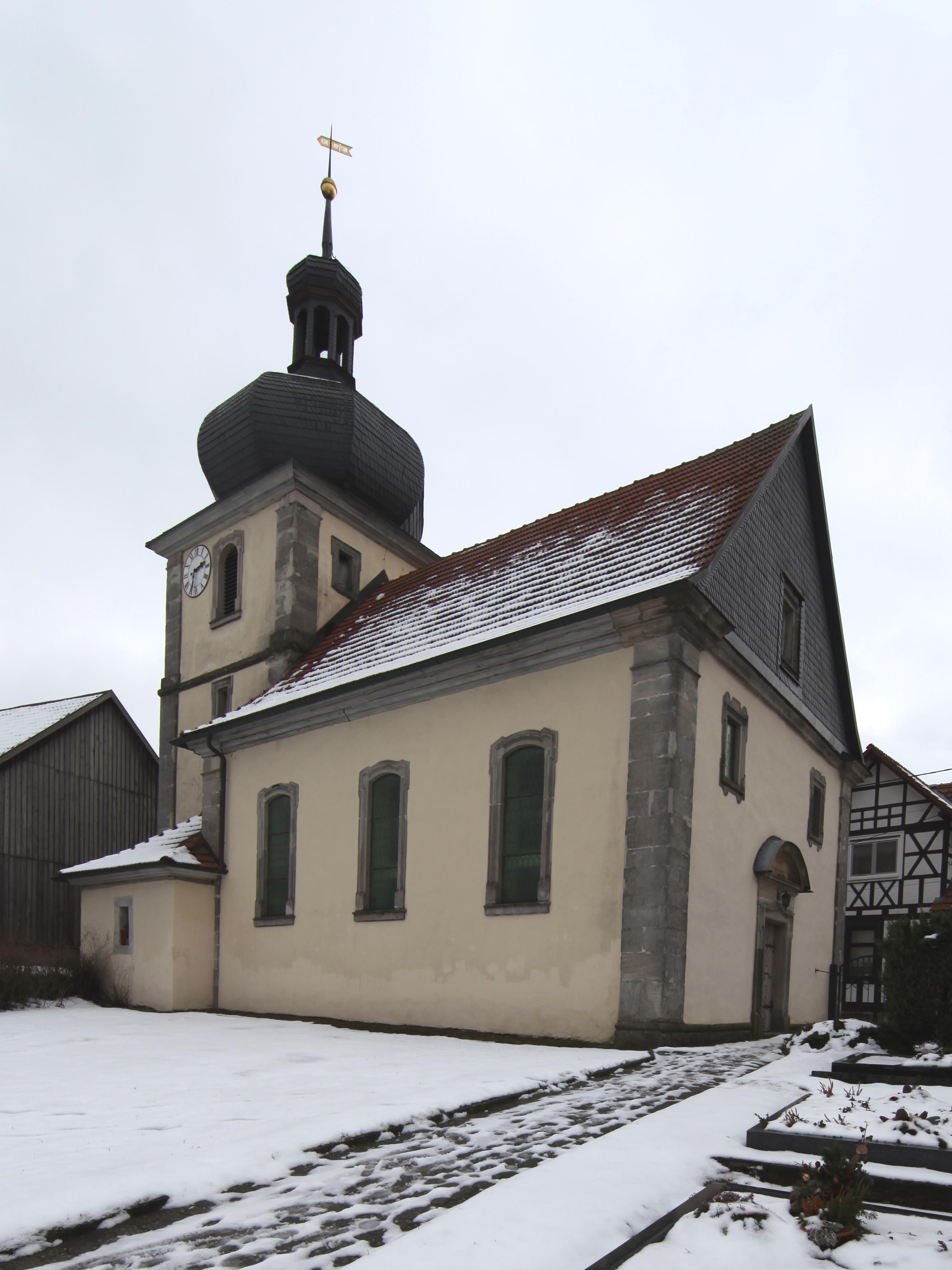 Ev. Kirche Zur Ruhe Gottes in Käßlitz, OT von Hellingen, Landkreis Hildburghausen